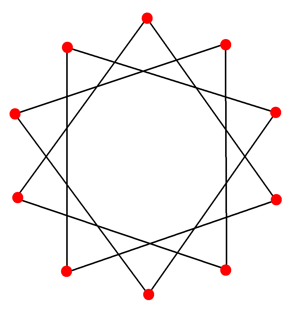 Decagram {10/3}